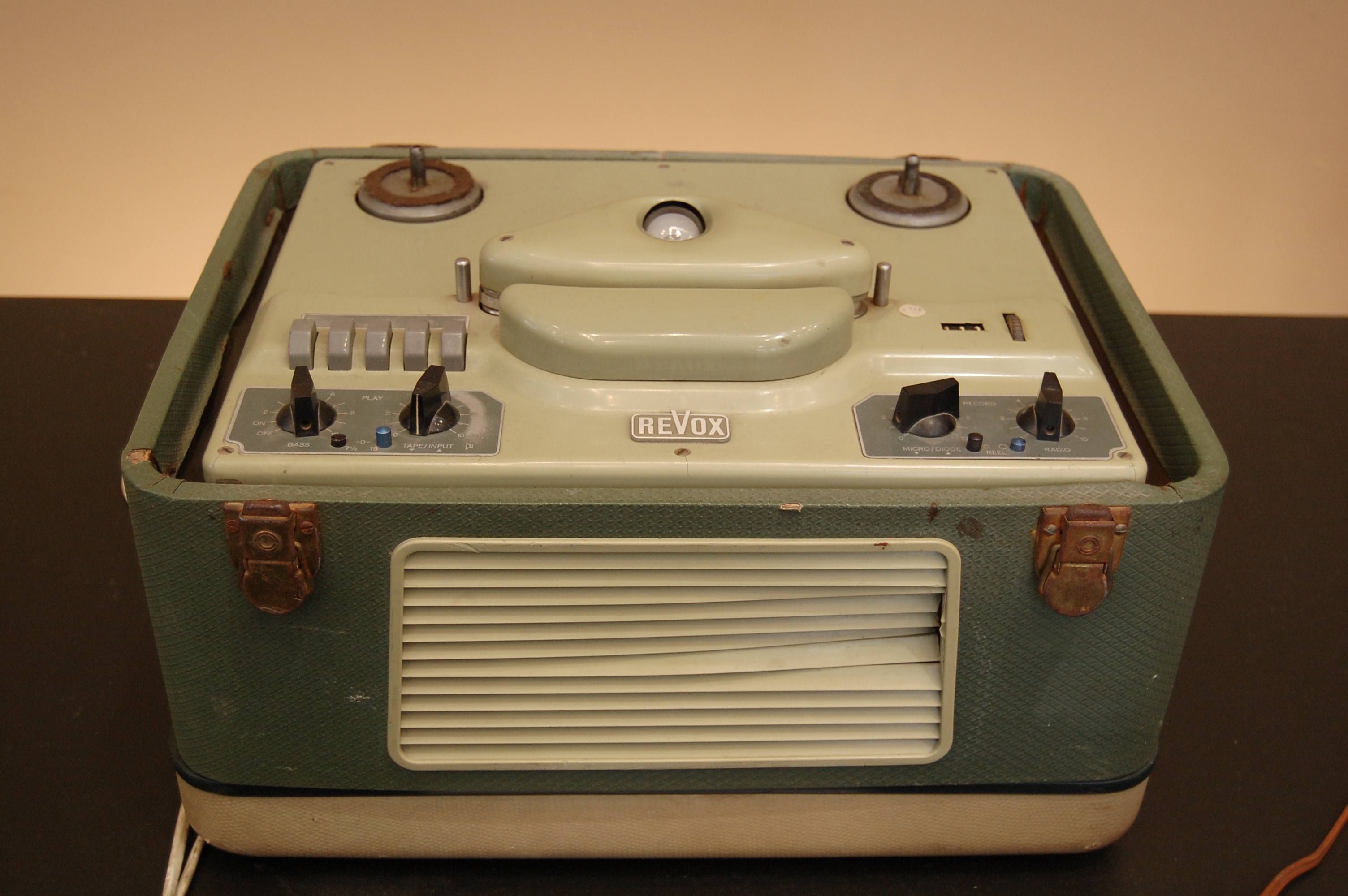 A Revox D-36 reel-to-reel tape recorder. Made in Switzerland around 1960.